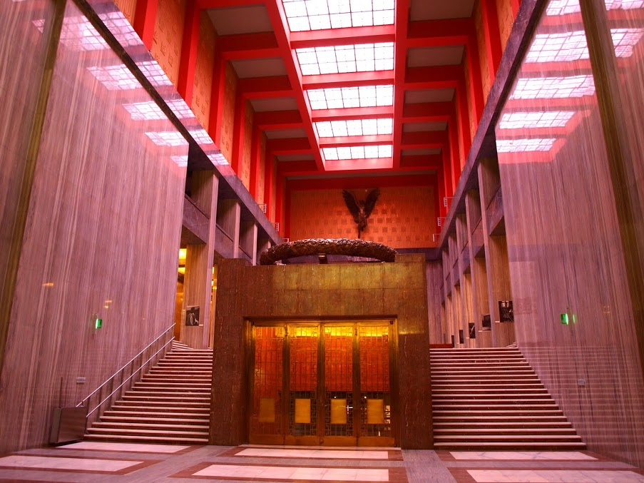 Pohled do velkého sálu památníku